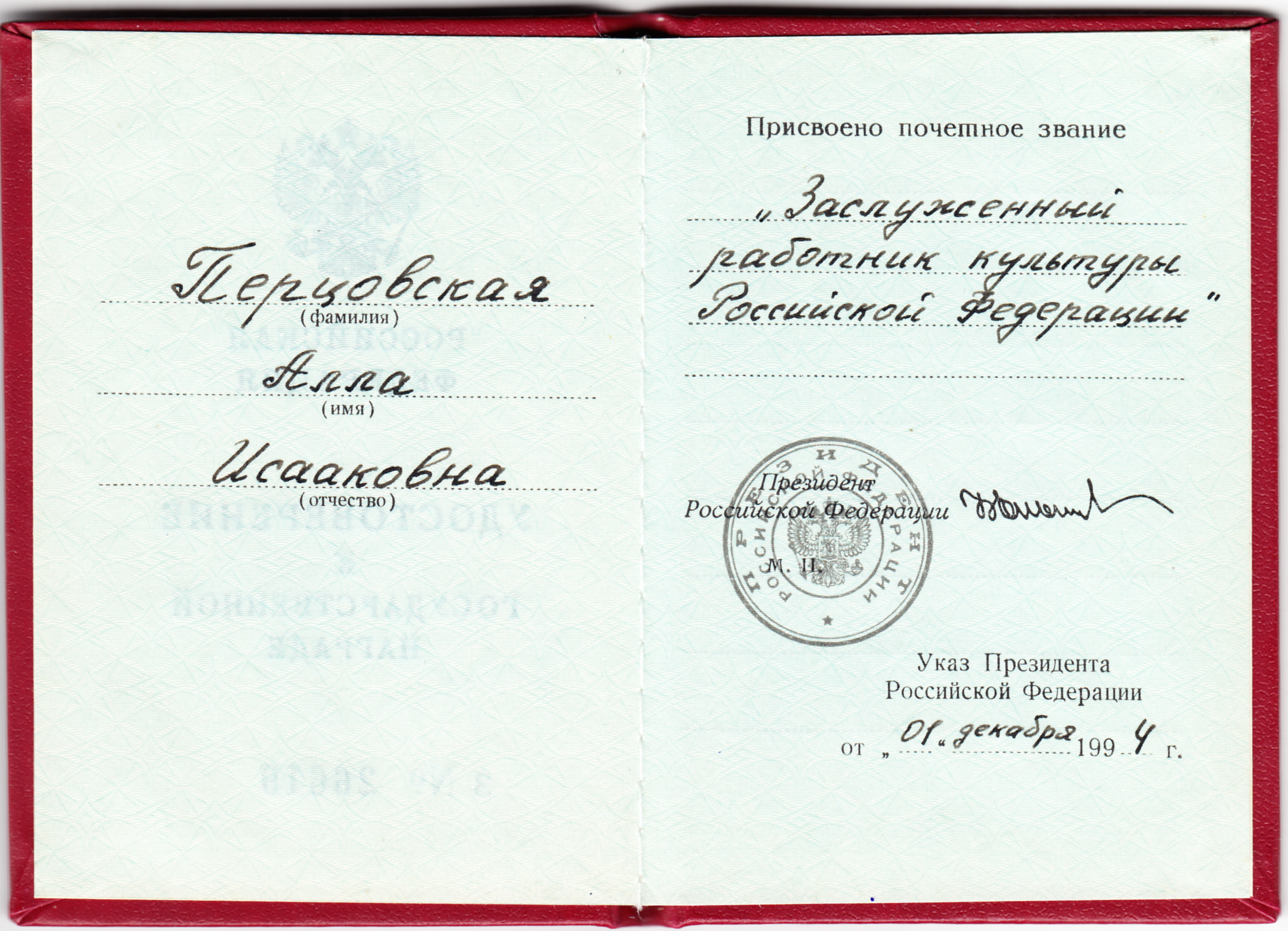 Удостоверение о присвоении звания "Заслуженный работник культуры РФ" Перцовской Алле Исааковне